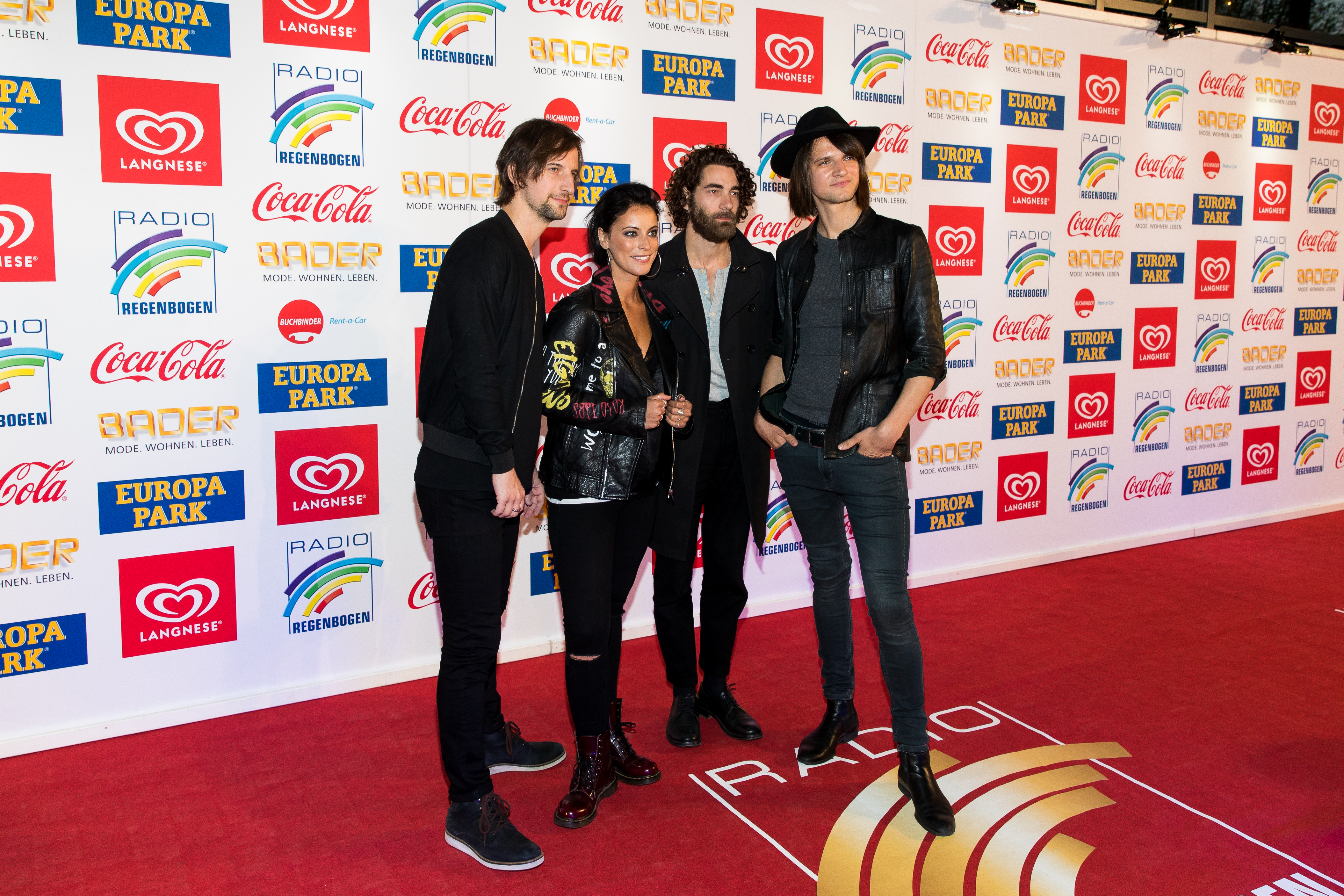 during Radio Regenbogen Award 2017 at Europapark, Rust, Baden-Württemberg, Germany on 2017-04-07, Photo: Sven Mandel